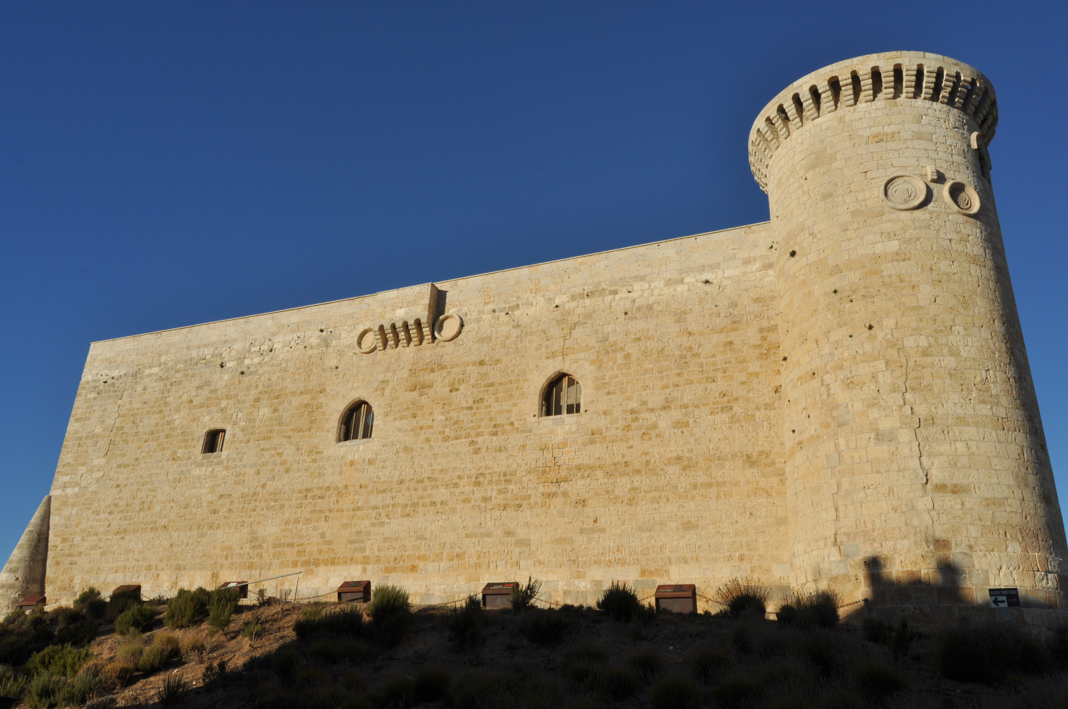 Fuentes de Valdepero - 006